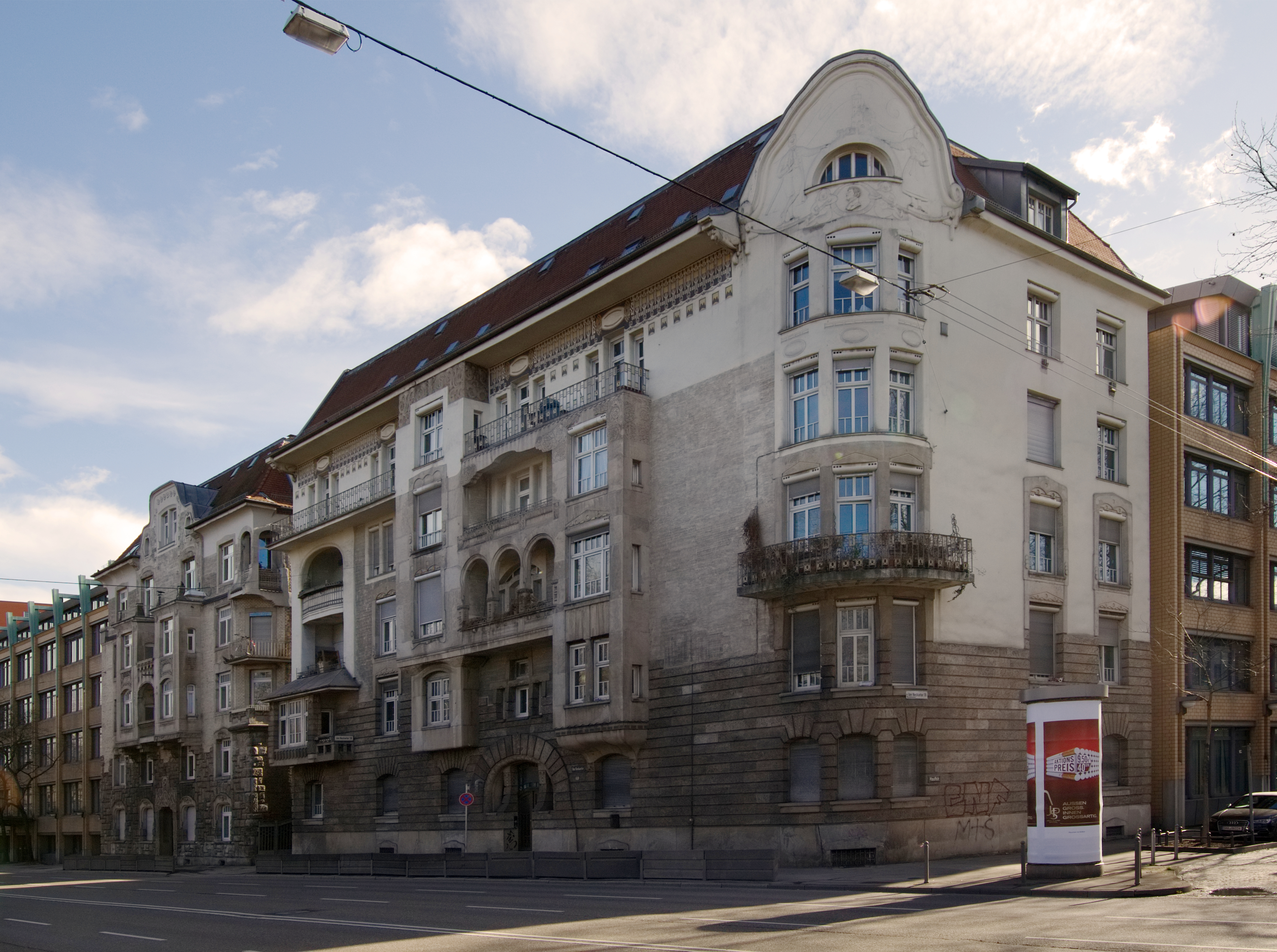 Mehrfamilienwohnhäuser Am Neckartor 18 und 20 in Stuttgart; erbaut 1904-1907 von Emil Rein im Jugendstil; unter Denkmalschutz